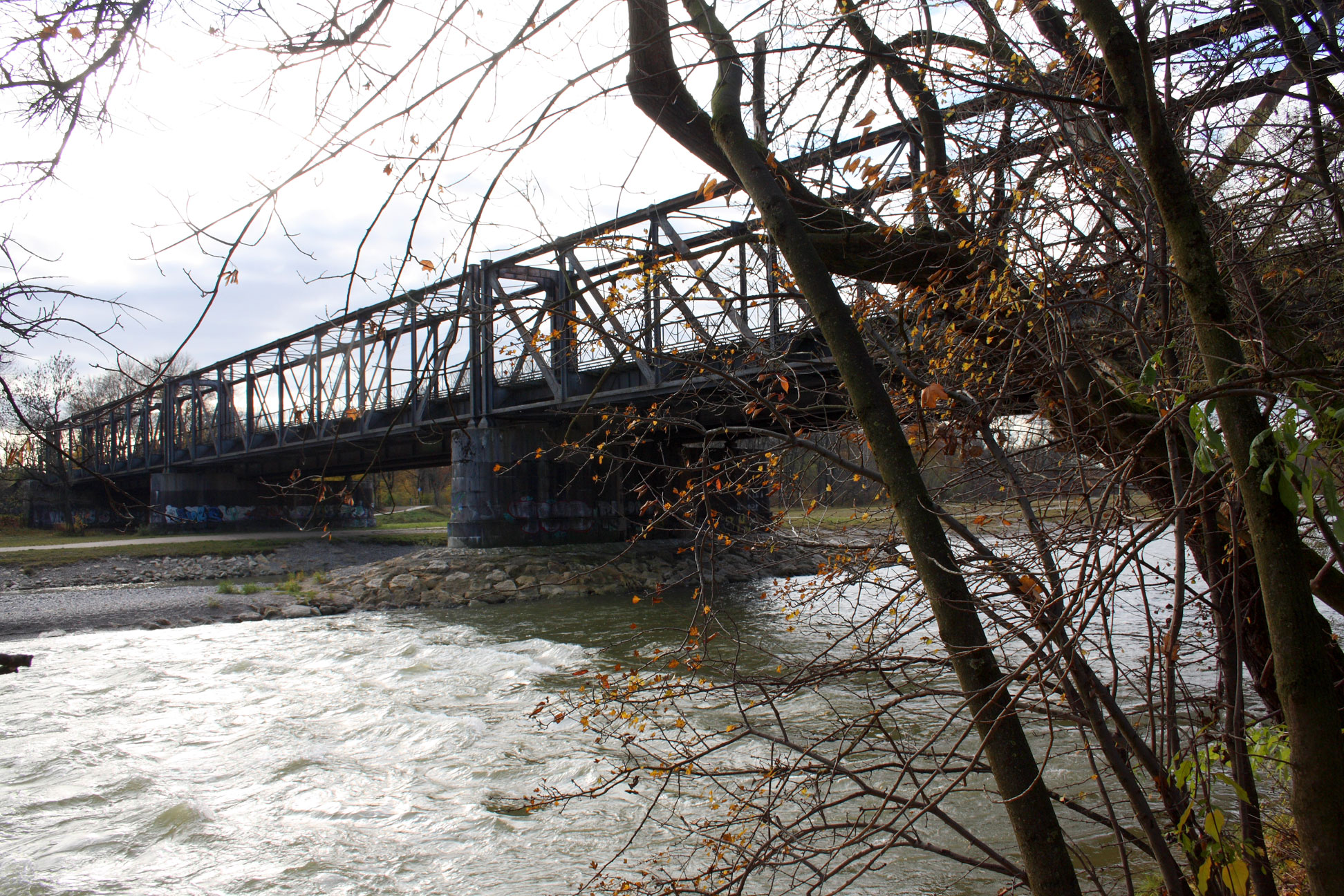 Braunauer Eisenbahnbruecke in München